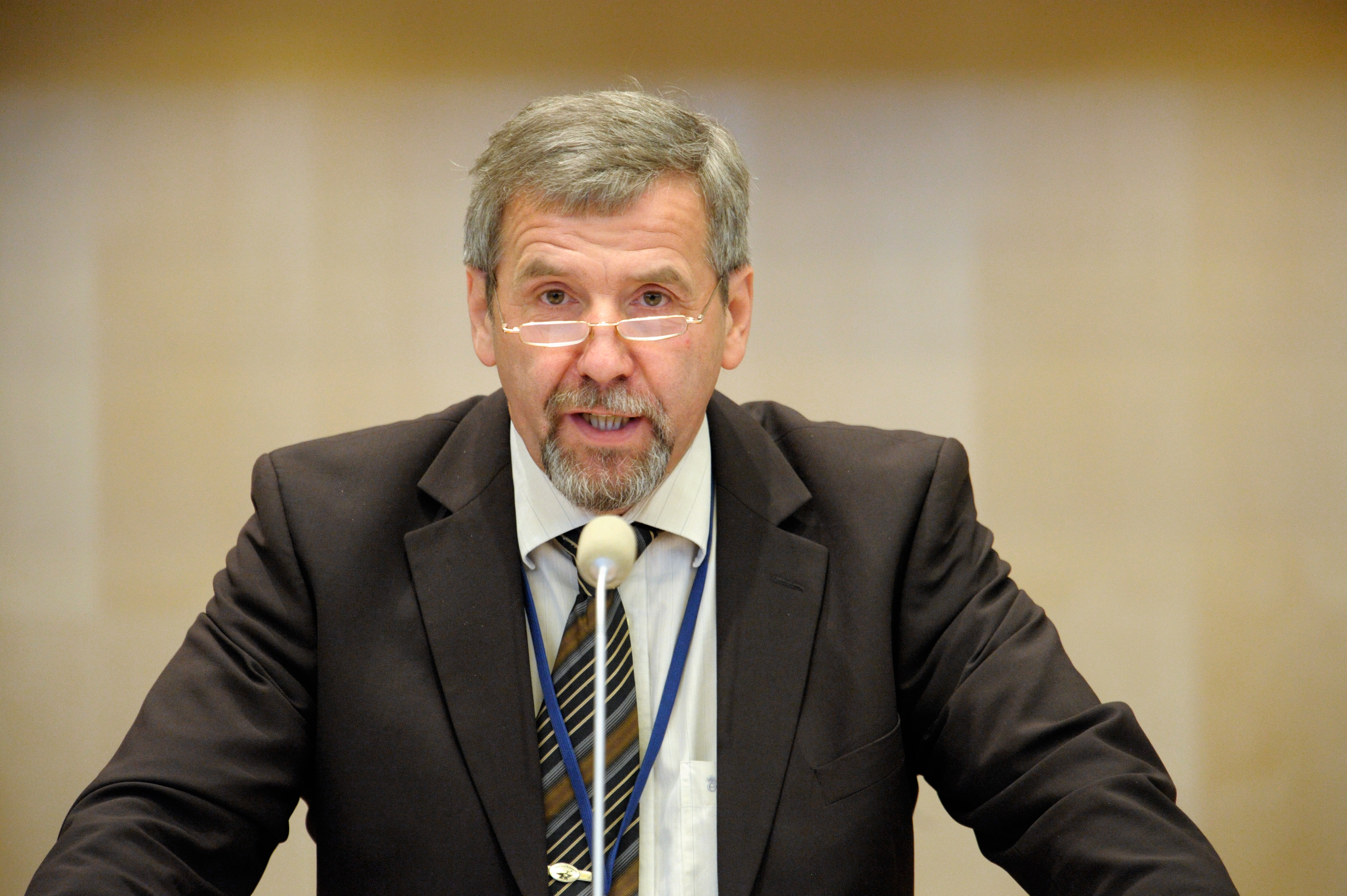 Kari P. Højgaard, viceordförande i västnordiskarådet. Sessionen i Stockholm 2009.